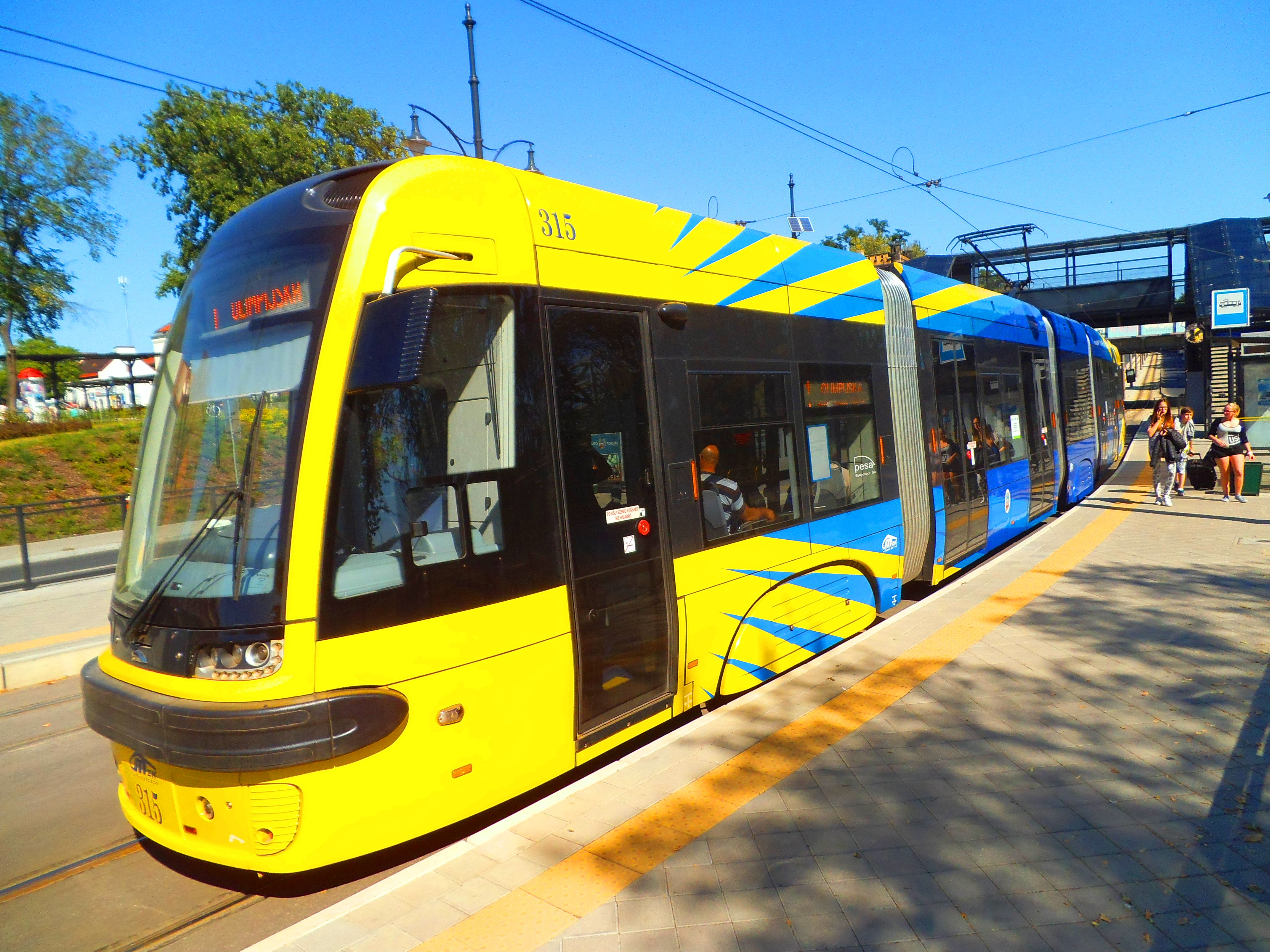 Pesa 122 NbT (pięcioczłonowy), Toruń